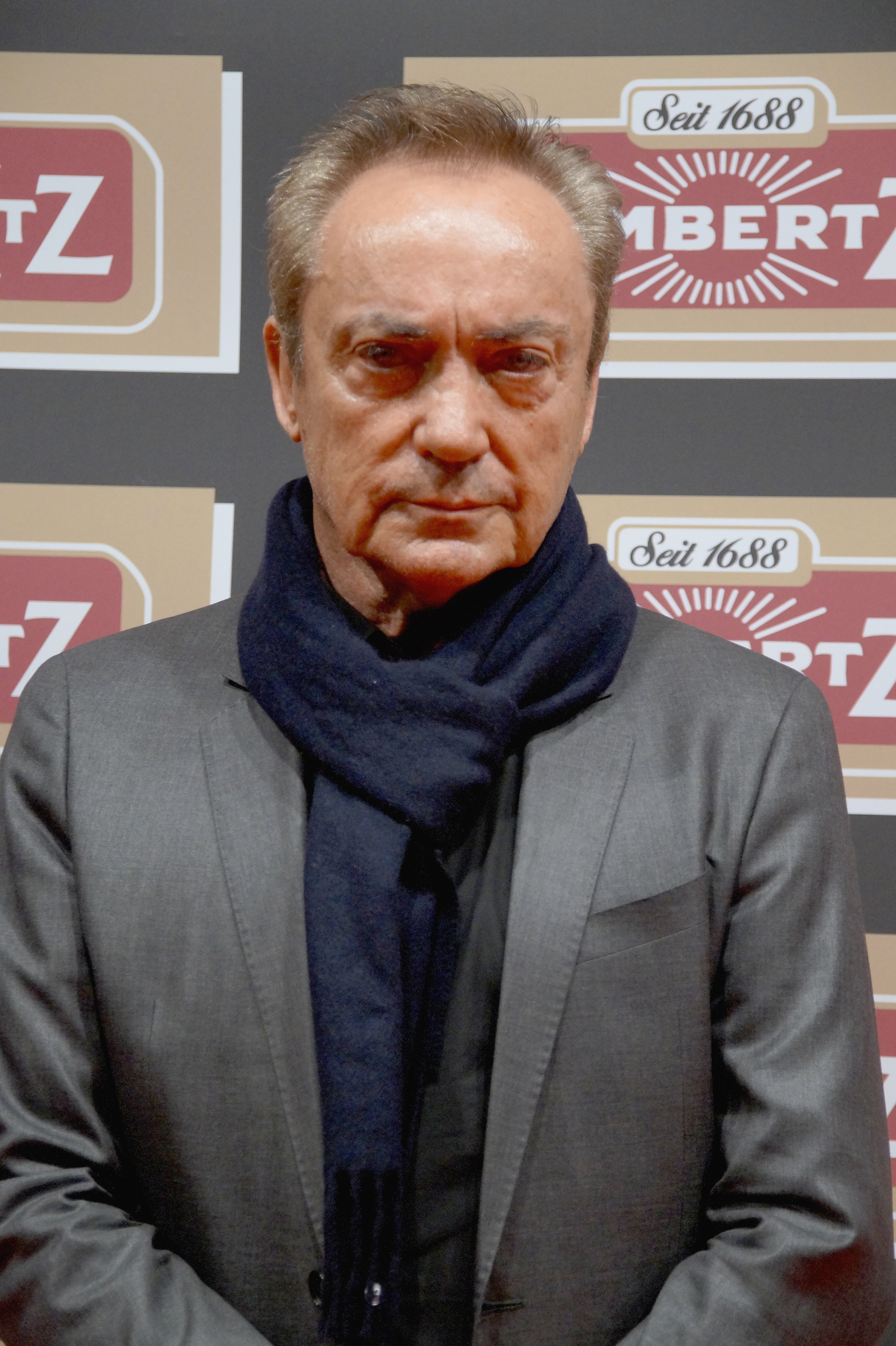 Udo Kier bei der Lambertz Monday Night, im Februar 2016.